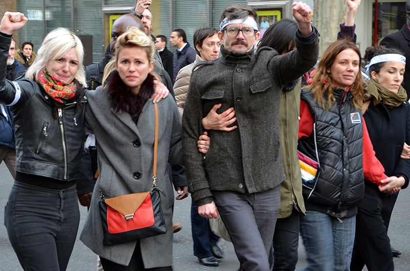 Manifestation en hommage aux morts des attentats de janvier 2015 à Paris, le 11 janvier 2015. Au centre, Luz, dessinateur de Charlie Hebdo, survivant de l'attentat du 7 janvier ; à gauche, Sarah Constantin, journaliste et Femen.